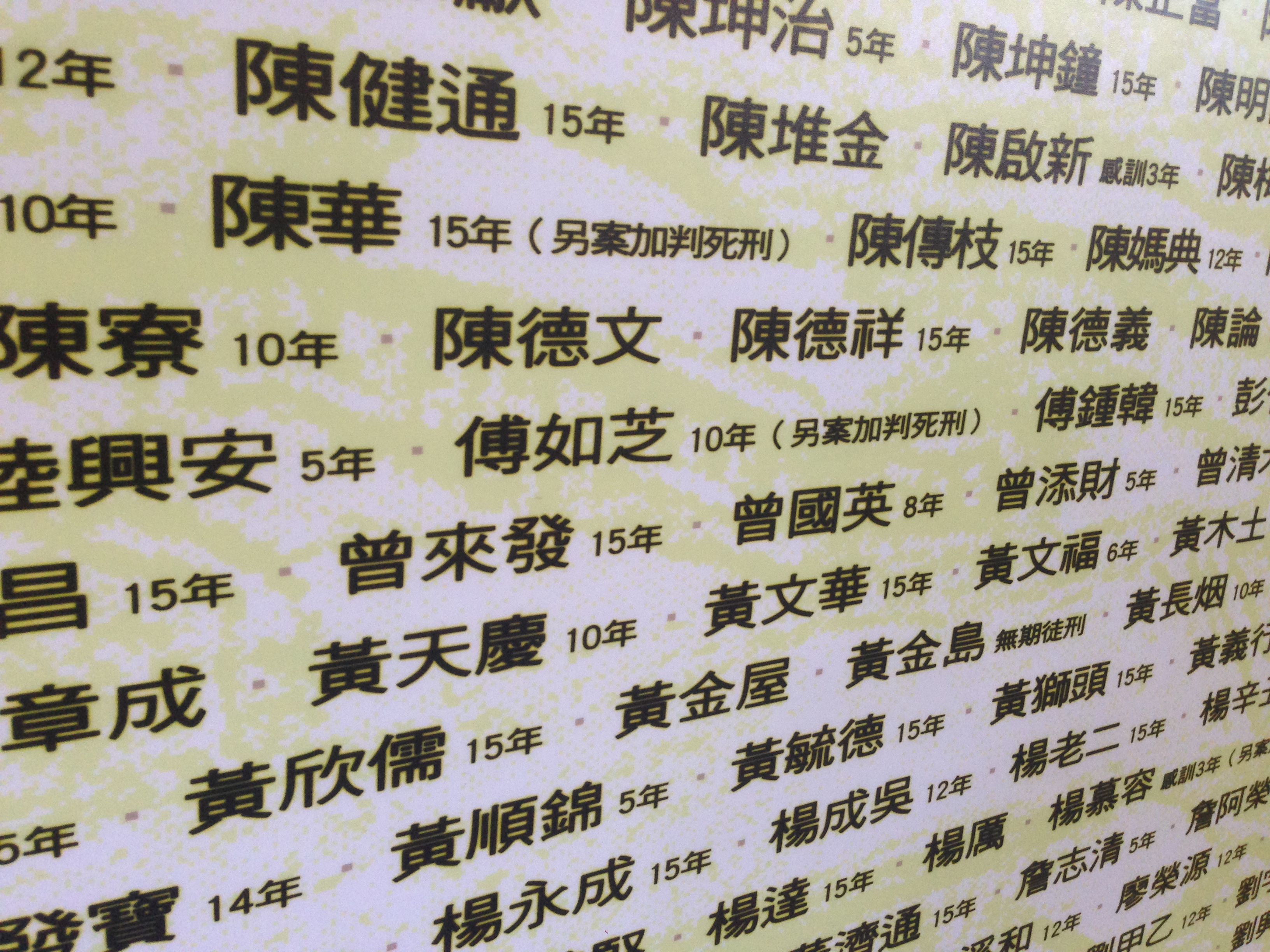 綠島人權文化園區新生訓導處第三大隊展示區的部分囚犯人名